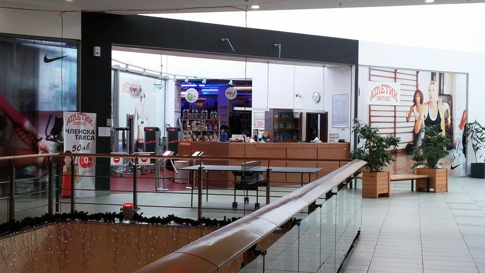 Фитнесът в мол Галериа Стара Загора